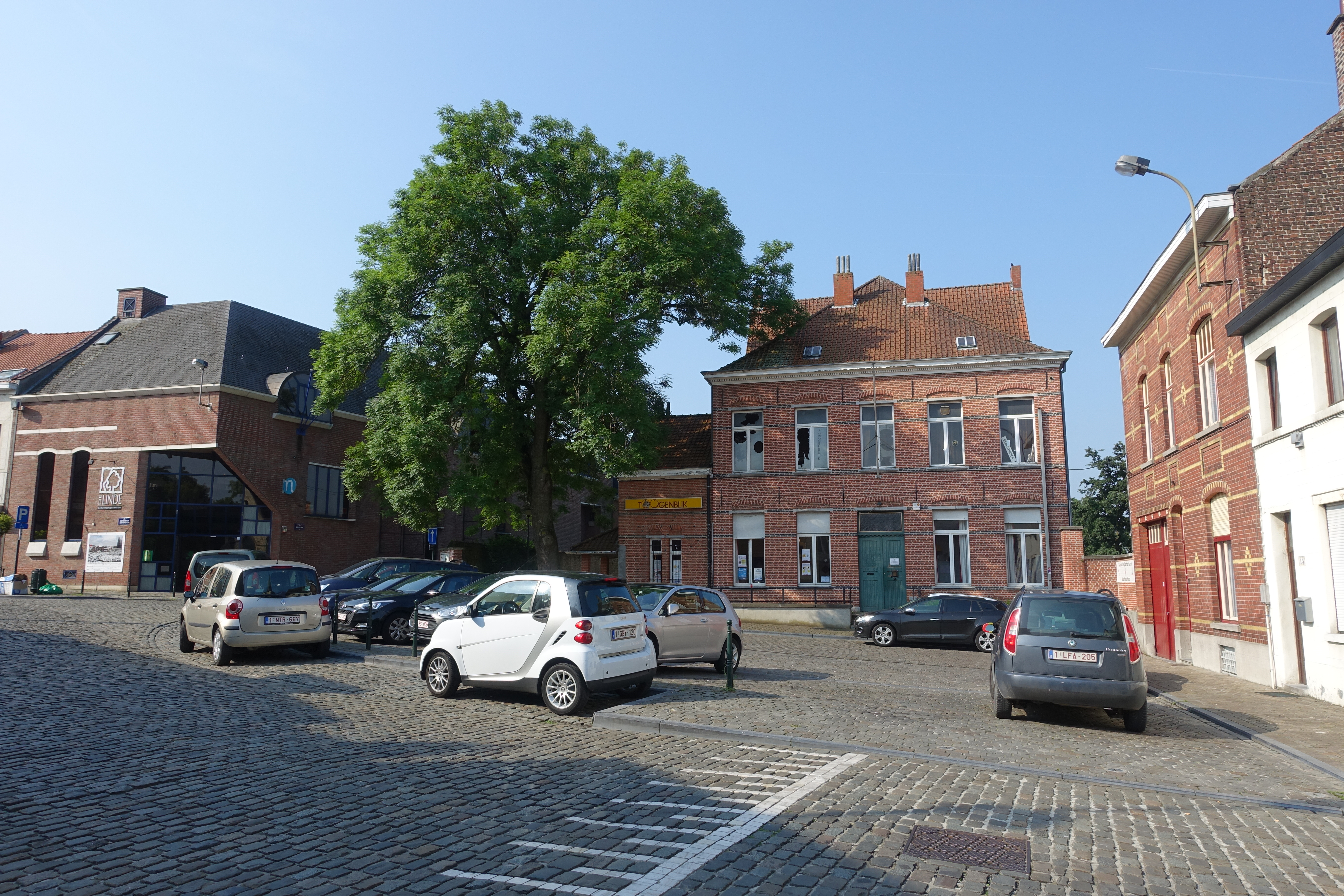 Dorpsplein van Haren met club Toogenblik en Gemeenschapscentrum De Linde